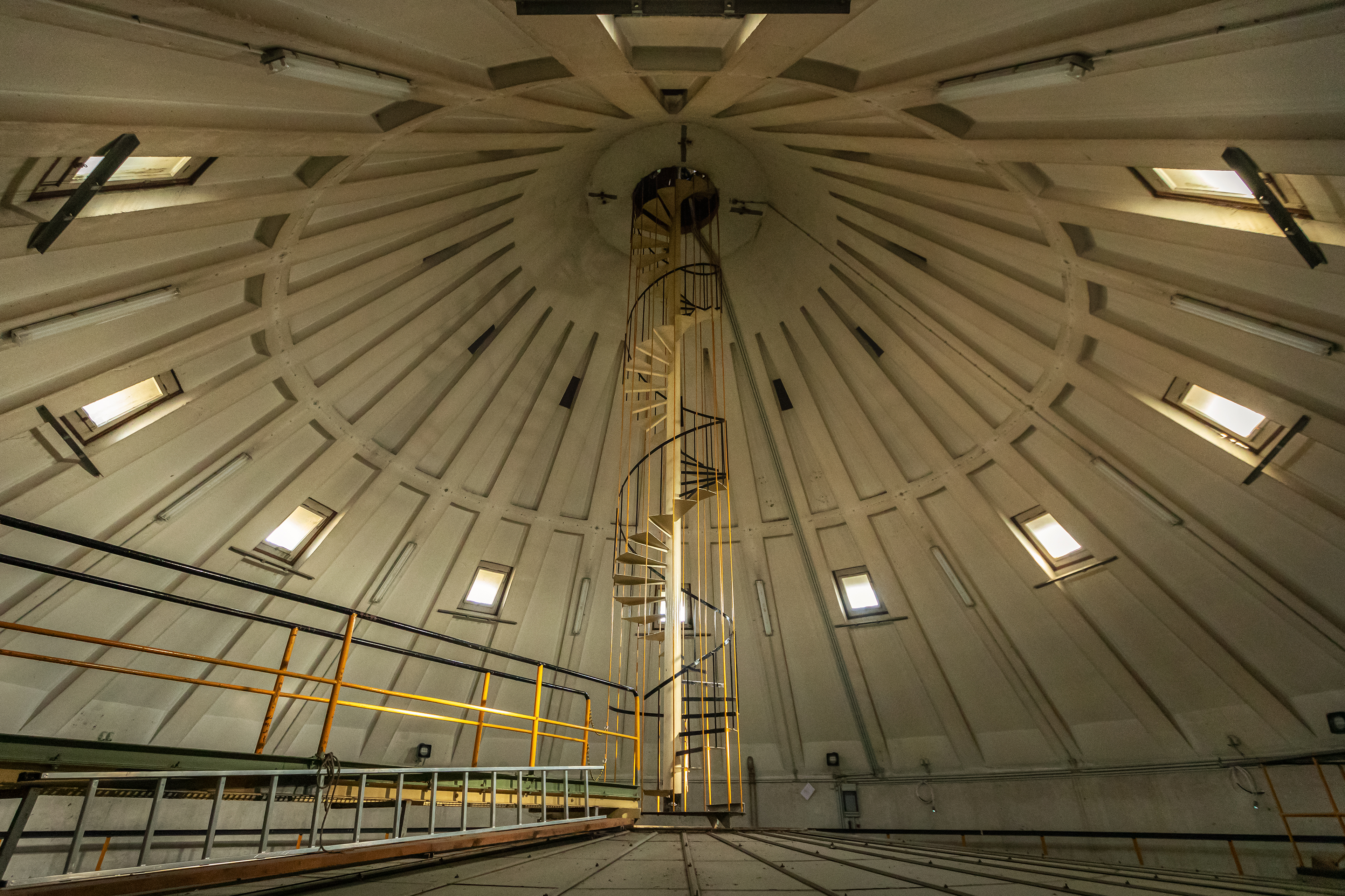 Am Dach von Mannheimer Wasserturm